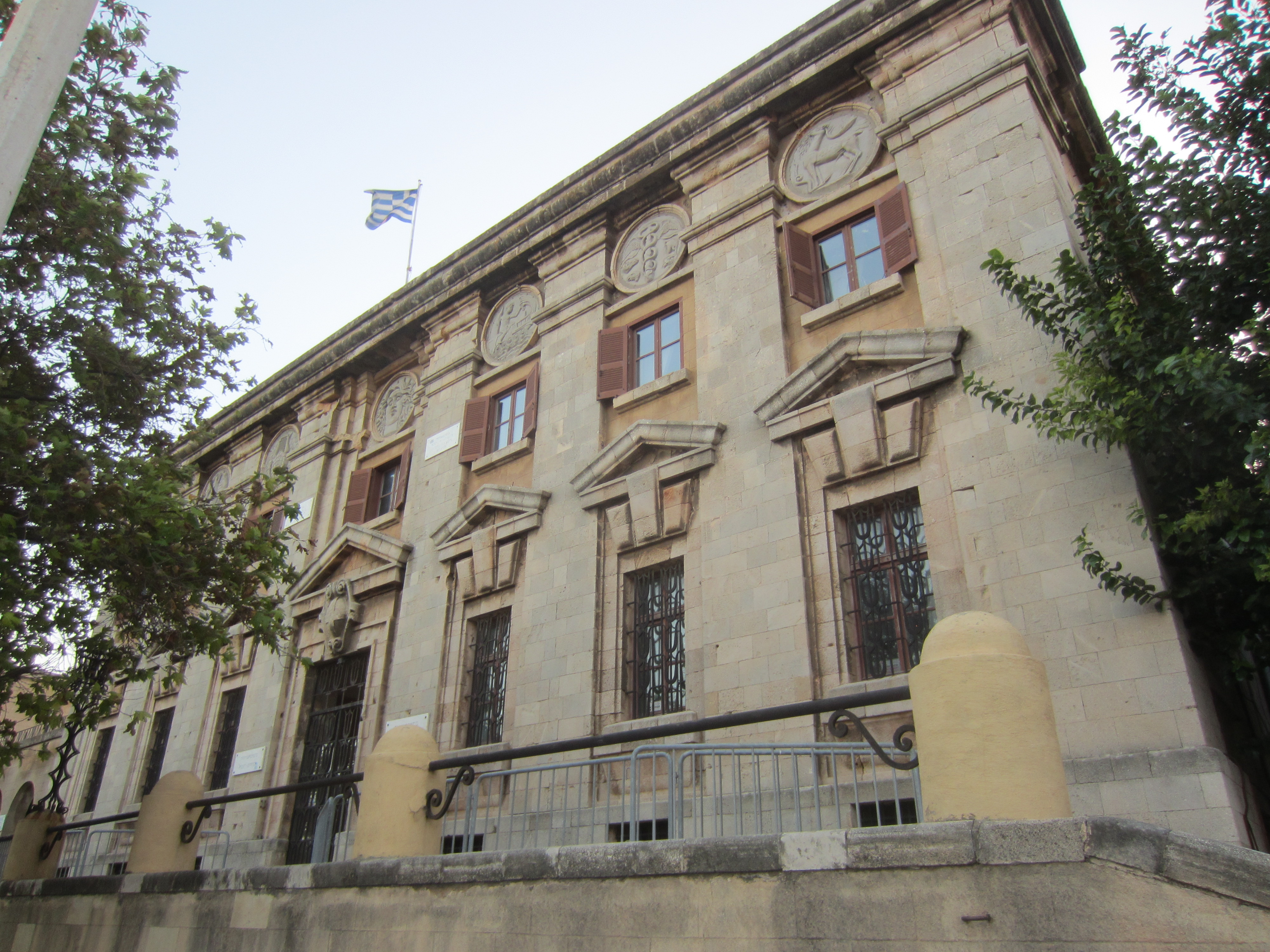 Родос. Почтовый дворец (Palazzo delle Poste). 1927-1928. Фасад. Архитектор Флорестано Ди Фаусто.